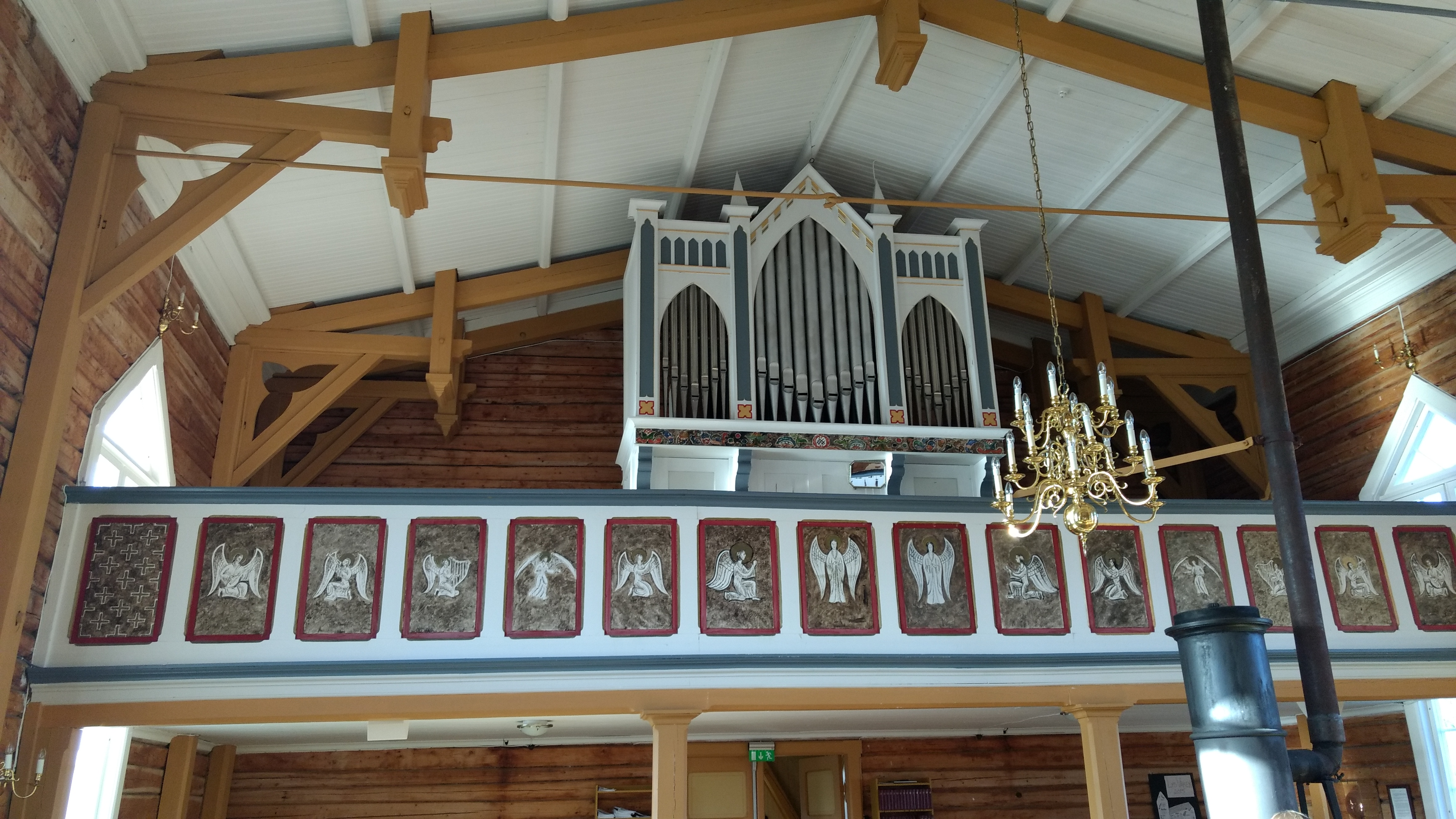 Galleri og orgel i Hillesøy kirke